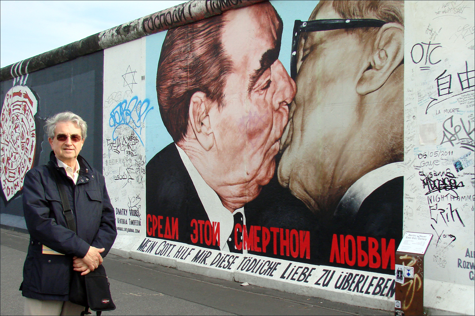 Le baiser fraternel (entre Brejnev et Honecker) il s'agit d'une des oeuvres les plus célèbres d'East-Side-Gallery Artiste : Dimitri Vrubel (1960-) East-Side-Gallery est un tronçon du mur de Berlin parallèle à la Spree et à la Mühlenstrasse qui a été peint par de nombreux artistes internationaux en 1990 sur le thème de la Paix et de la Réconciliation. Le site a été classé aux monuments historiques. Il a été restauré en 2009 à cause du vandalisme.